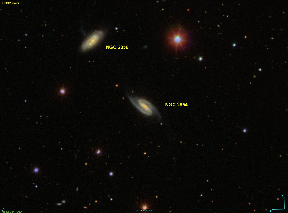 Image créée à l'aide du logiciel Aladin Sky Atlas du Centre de Données astronomiques de Strasbourg et des données publiques en format FIT de SDSS (Sloan Digital Sky Survey).